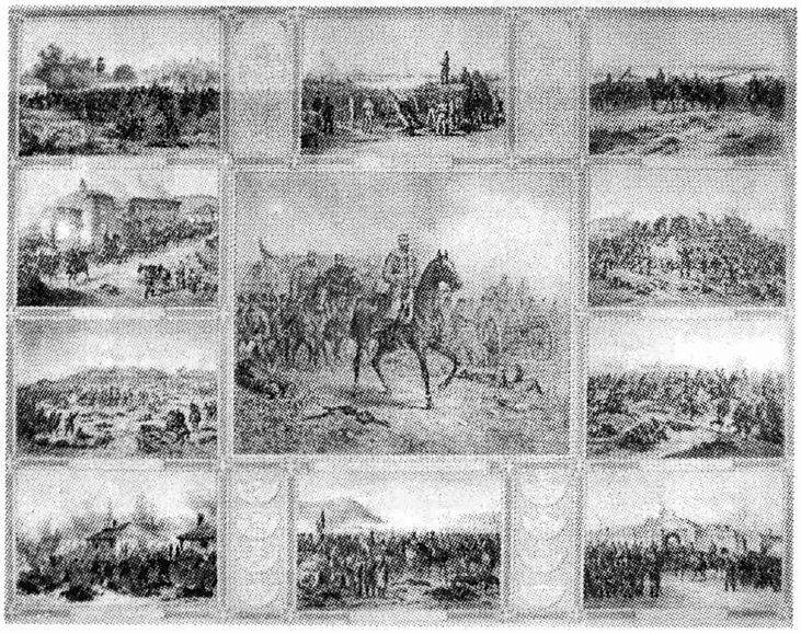 Johann Nepomuk Schönberg - Carol I al României în capul Armatei Sale din campania Războiului din 1877-1878 - litografia se află astăzi la Biblioteca Academiei Române, Secția de stampe